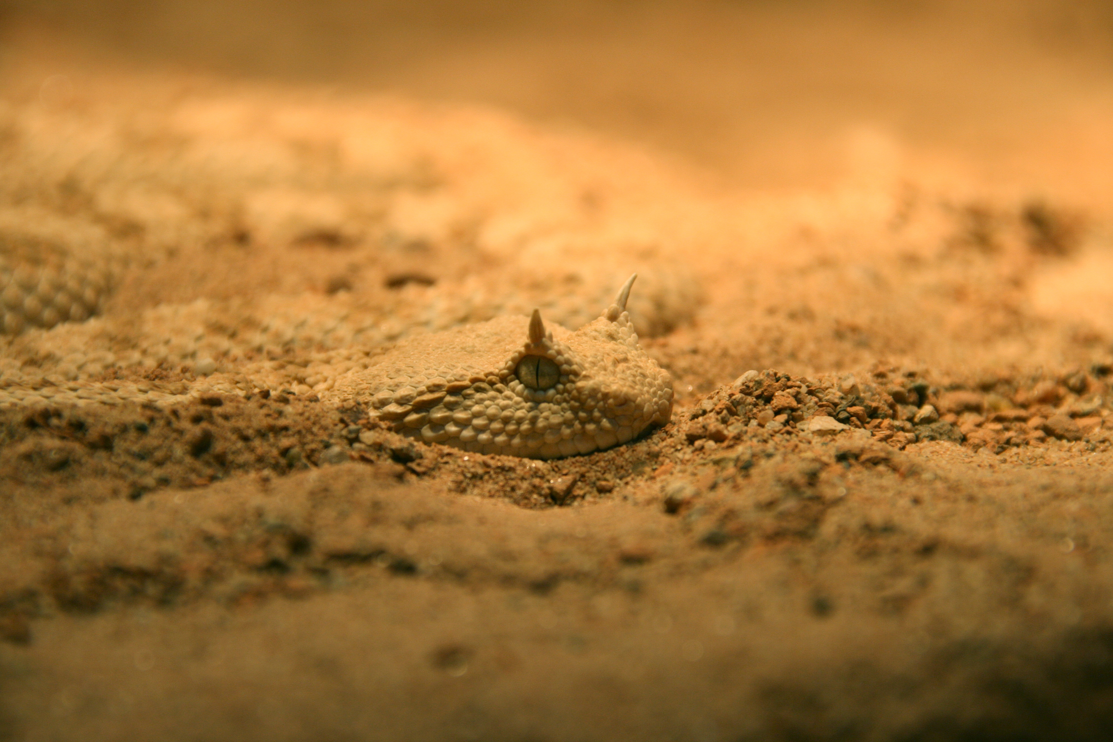 Kopf einer sich eingegrabenen Wüsten-Hornviper (Cerastes cerastes).